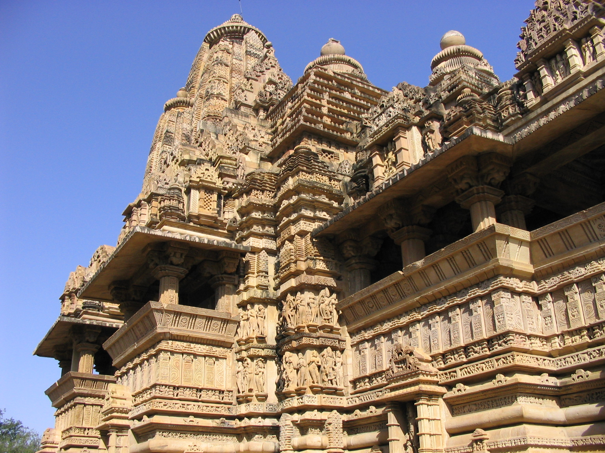 Khajuraho Laksmahna Temple